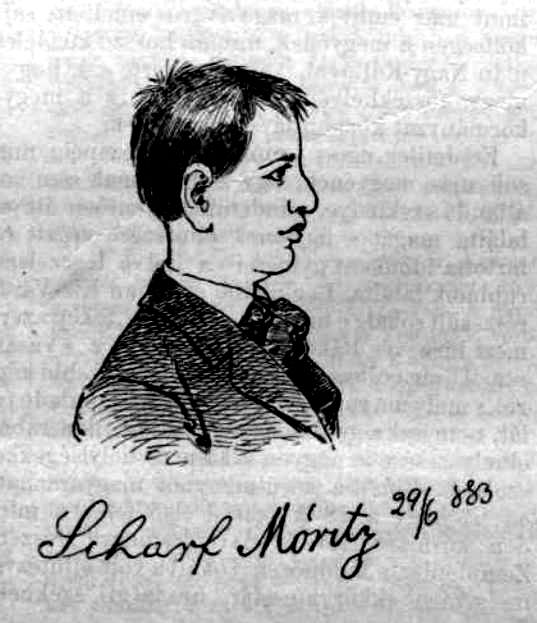 Scharf Móric portréja, aki a tiszaeszlári pör egyik szereplője volt. Vasárnapi Ujság illusztrációja